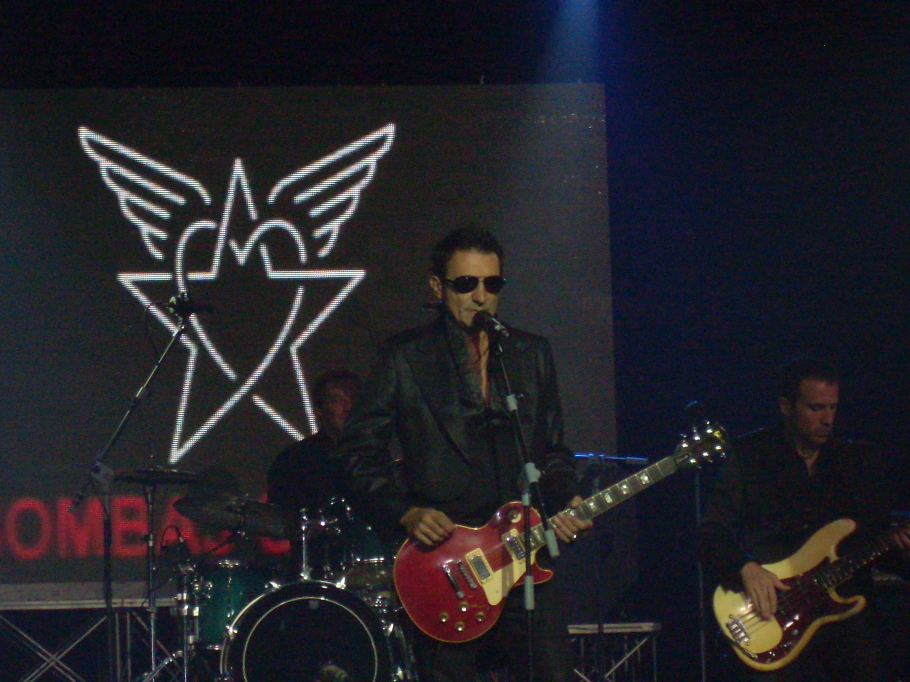 Branko Đurić performing with Bombaj Štampa live in Sarajevo